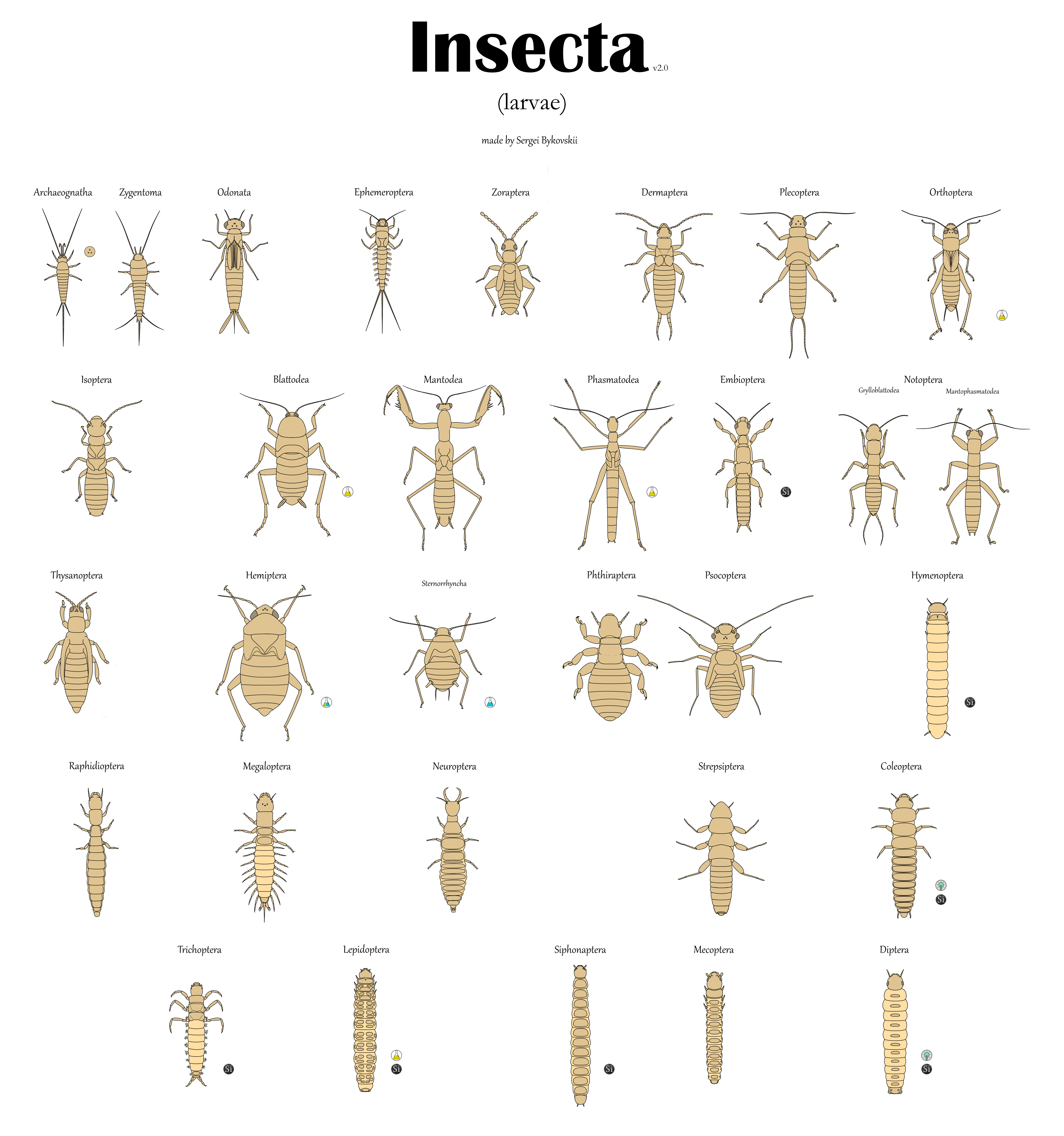 Сводная схема всех отрядов насекомых (на стадии личинки) + я выделил небольшие группы, которые, на мой взгляд, могли бы побороться за статус отряда. Делал это для всех, по этому всё в свободном доступе. Надеюсь, пригодится всем, так как столкнулся с проблемой, что не существует сводной схемы, где изображались бы все отряды (нормально нарисованные). Постарался изобразить каждого максимально усреднённо, а не как на некоторых схемках - когда нарисован какой-то конкретный представитель отряда.